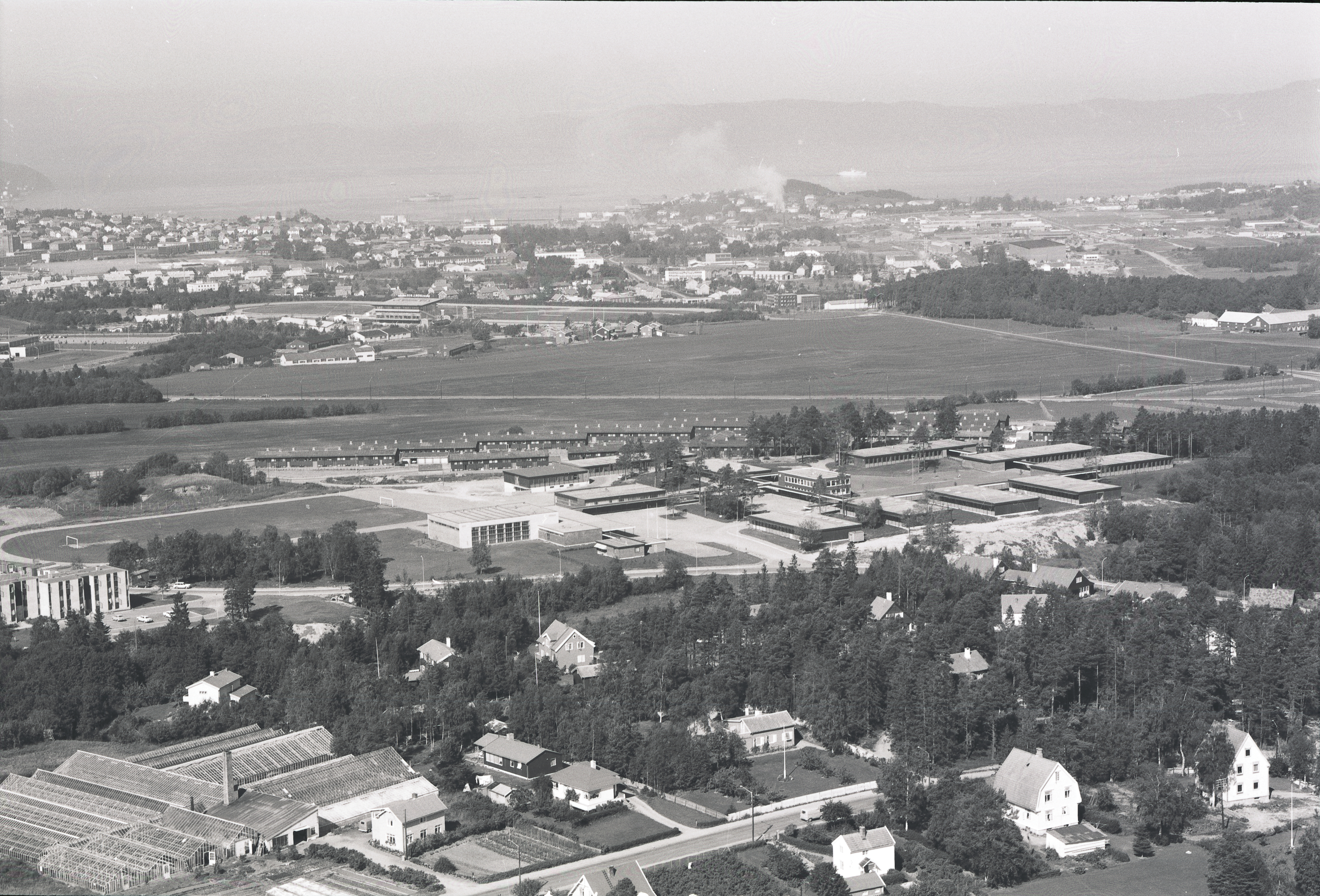 Skoler: Charlottenlund barne- og ungdomsskole i Tunvegen. Rekkehusene i Churchills vei. Omkjøringsveien. Leangen Travbane. Leangen. Bildet er tatt mot vest.